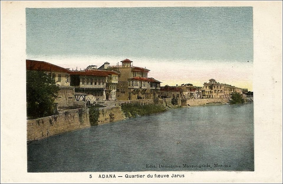 Quartier de fleuve Jarus